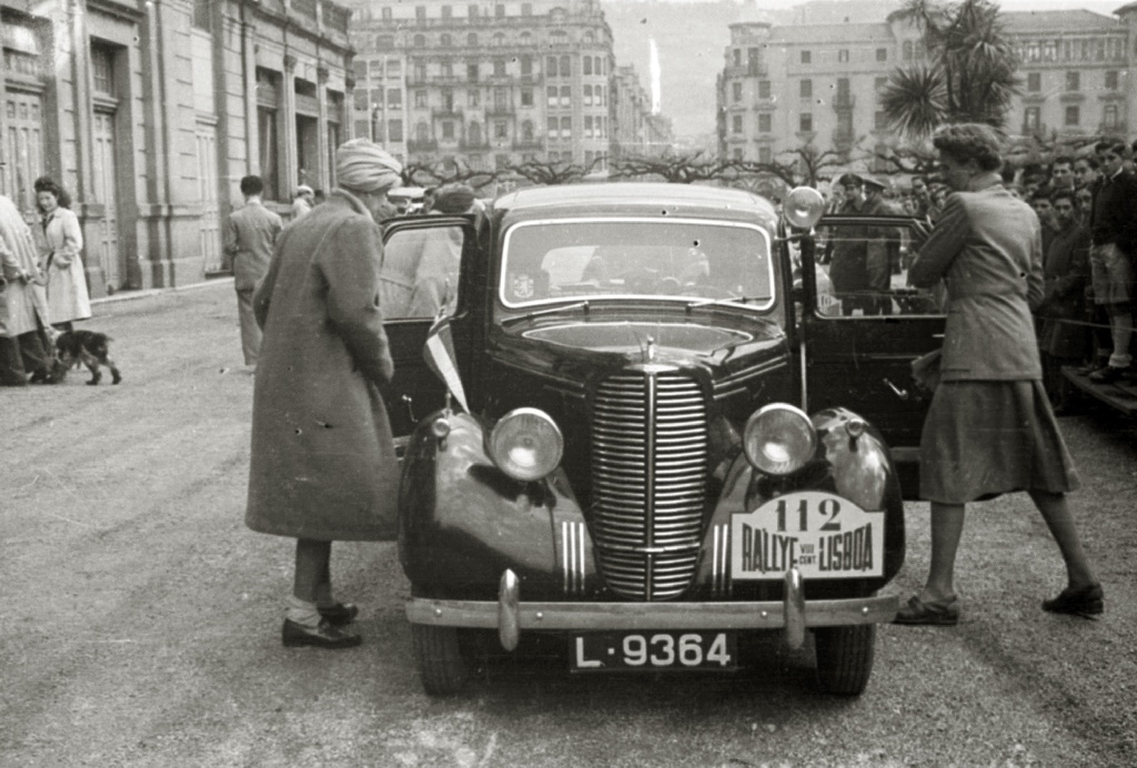 Título original: Rallye París-Lisboa (4/16) Localización: San Sebastián (Guipúzcoa)